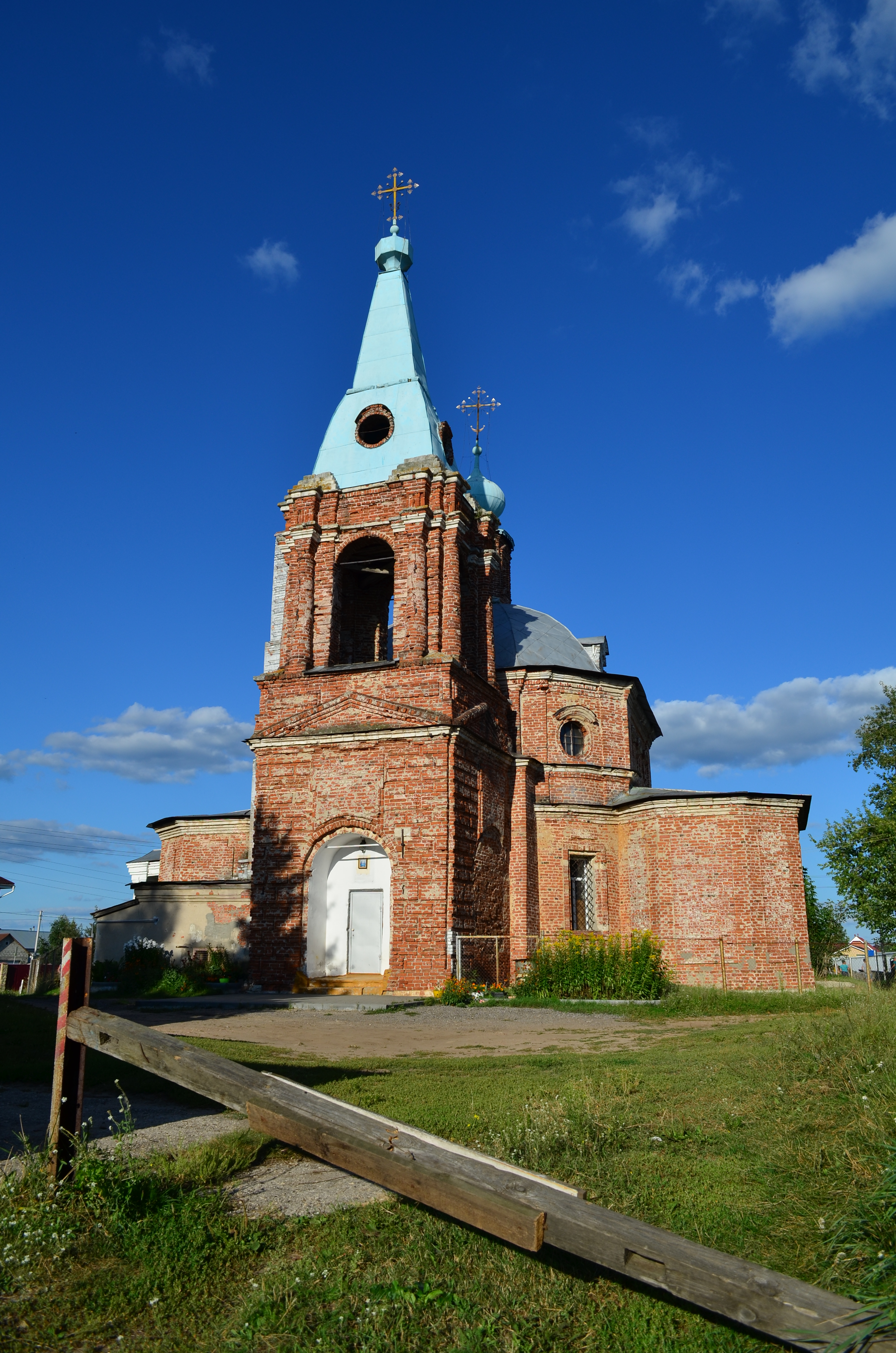 Церковь Преображения Господня в Шумаши.